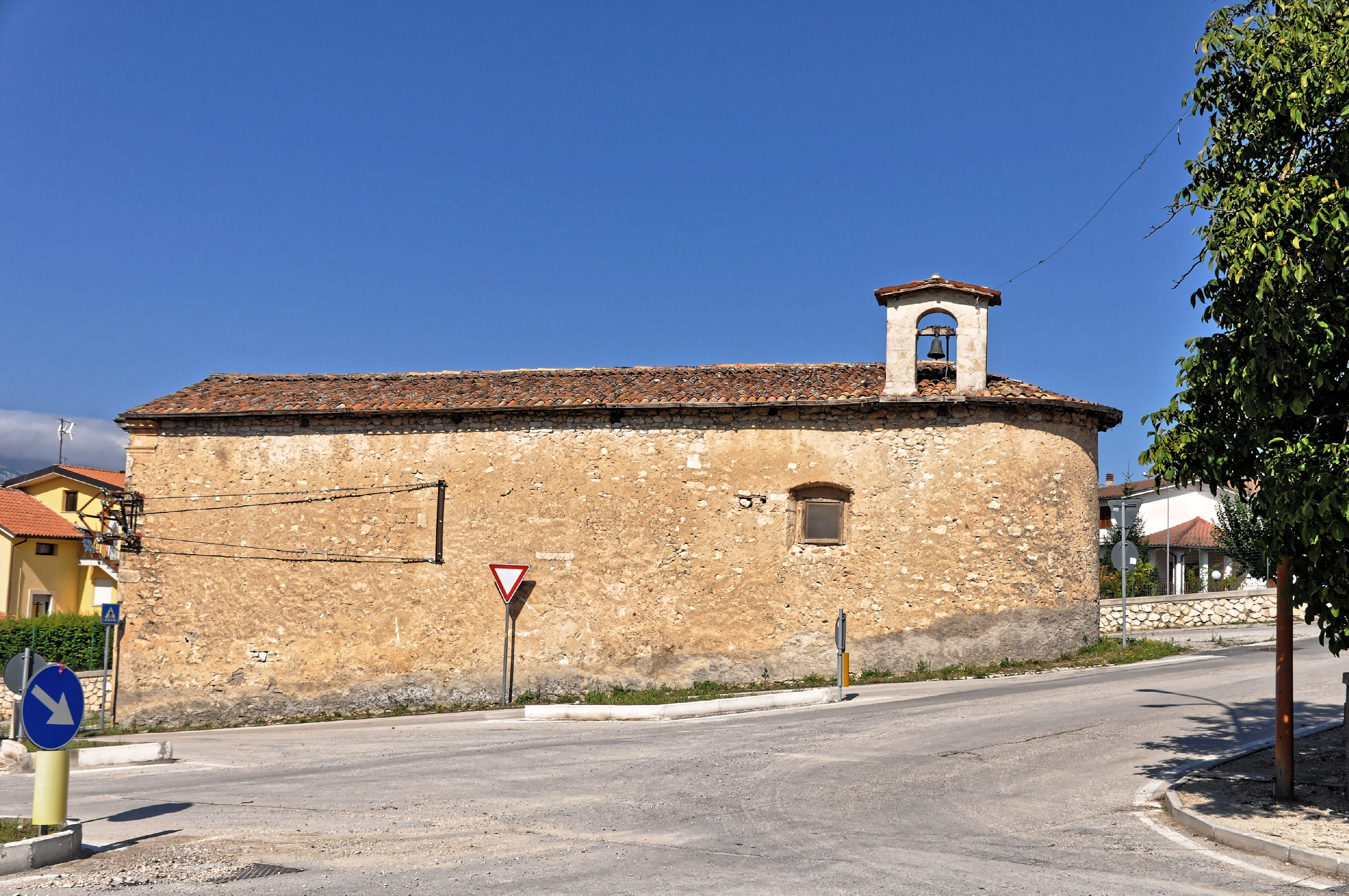 Poggio Picenze 2017